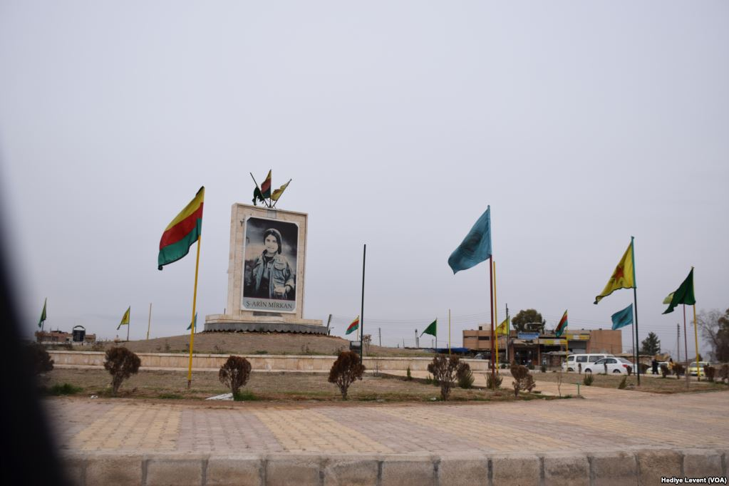 Mémorial à Hassaké, en Syrie, en hommage à Arin Mirkan, tuée pendant la bataille de Kobané. Photographié ici en décembre 2017.